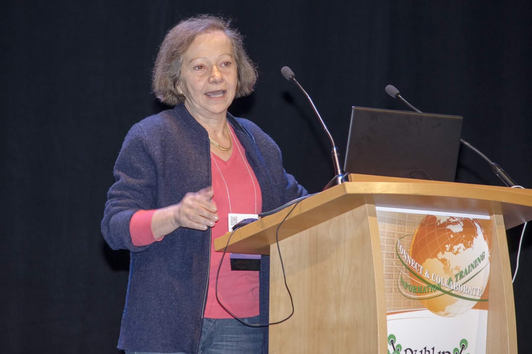 Anna Tramontano speaking in 2015